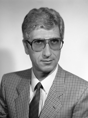 Il politico italiano Maurizio Lotti